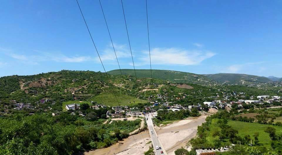 Puente vehicular muy cerca de Atlamajac